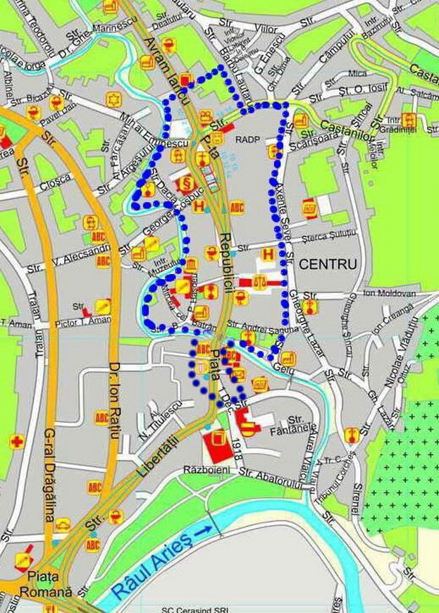 Ansamblul urban central din Turda (completarea unui plan mai vechi)